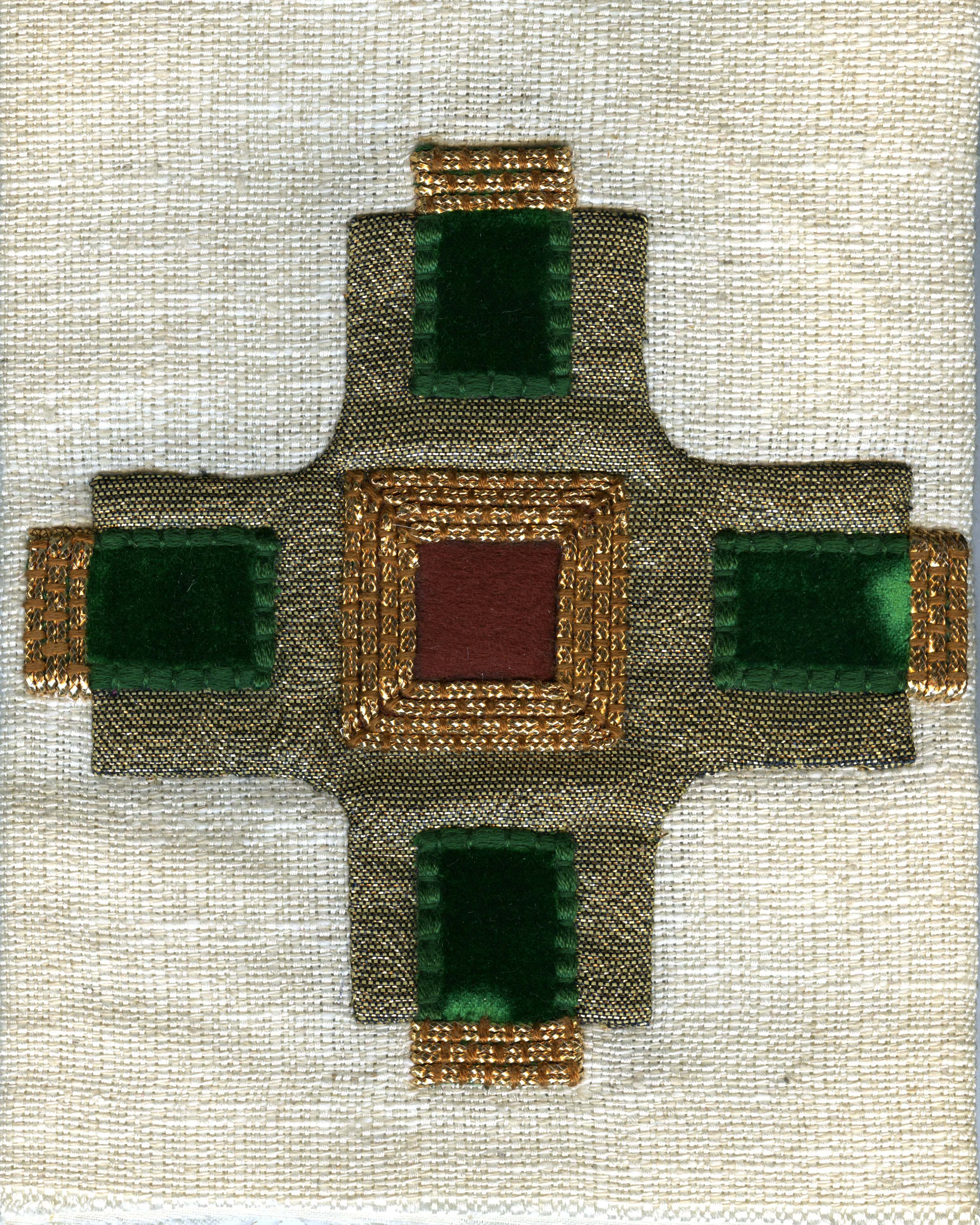 Geappliceerd kruis met verborgen steek, afgedekte randen en opgelegde gouddraad.